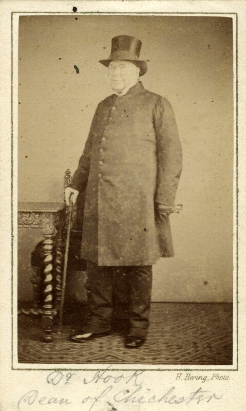 Photograph by Henry Hering